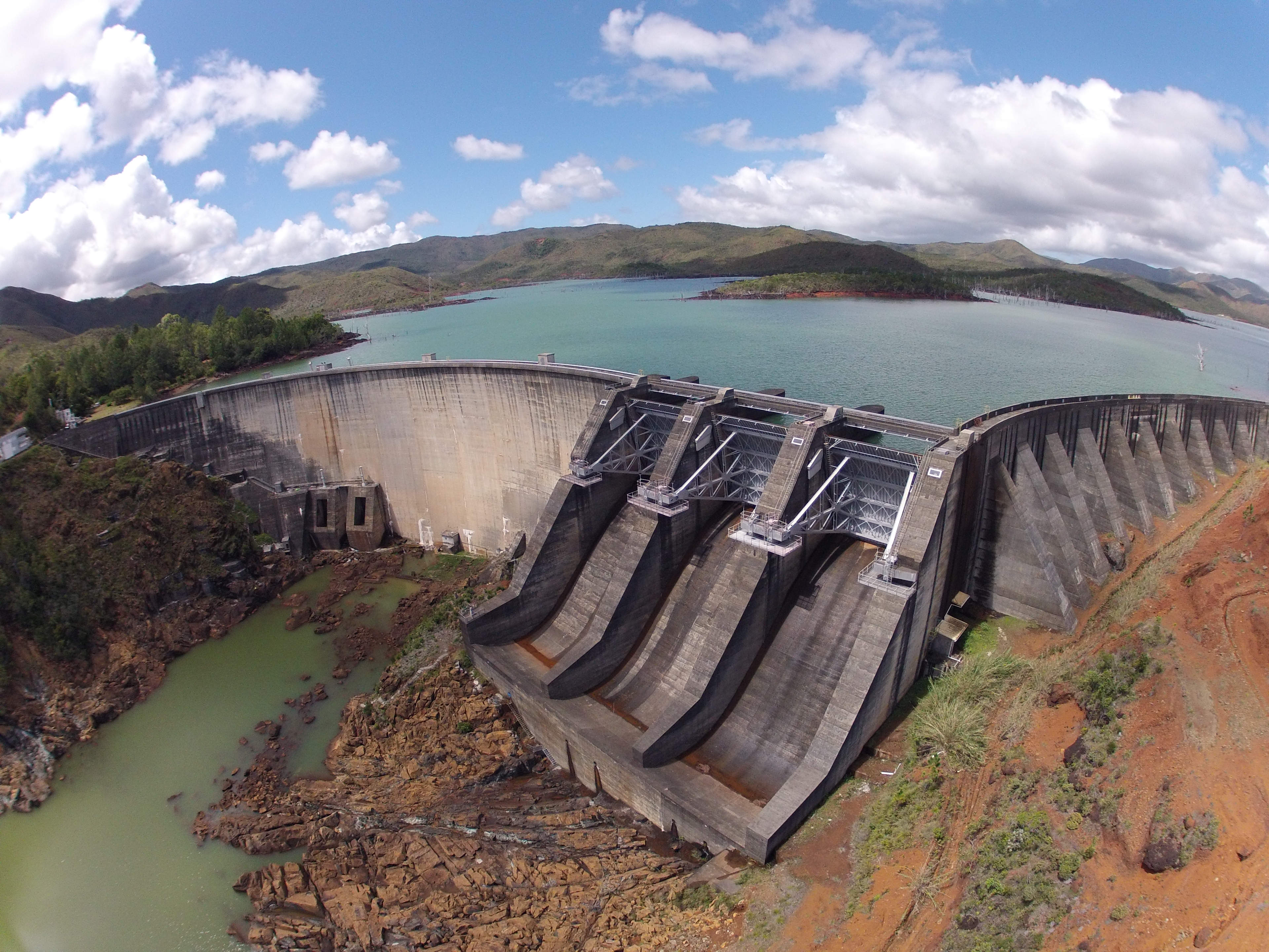 Vue aérienne du Barrage de Yaté, Nouvelle calédonie